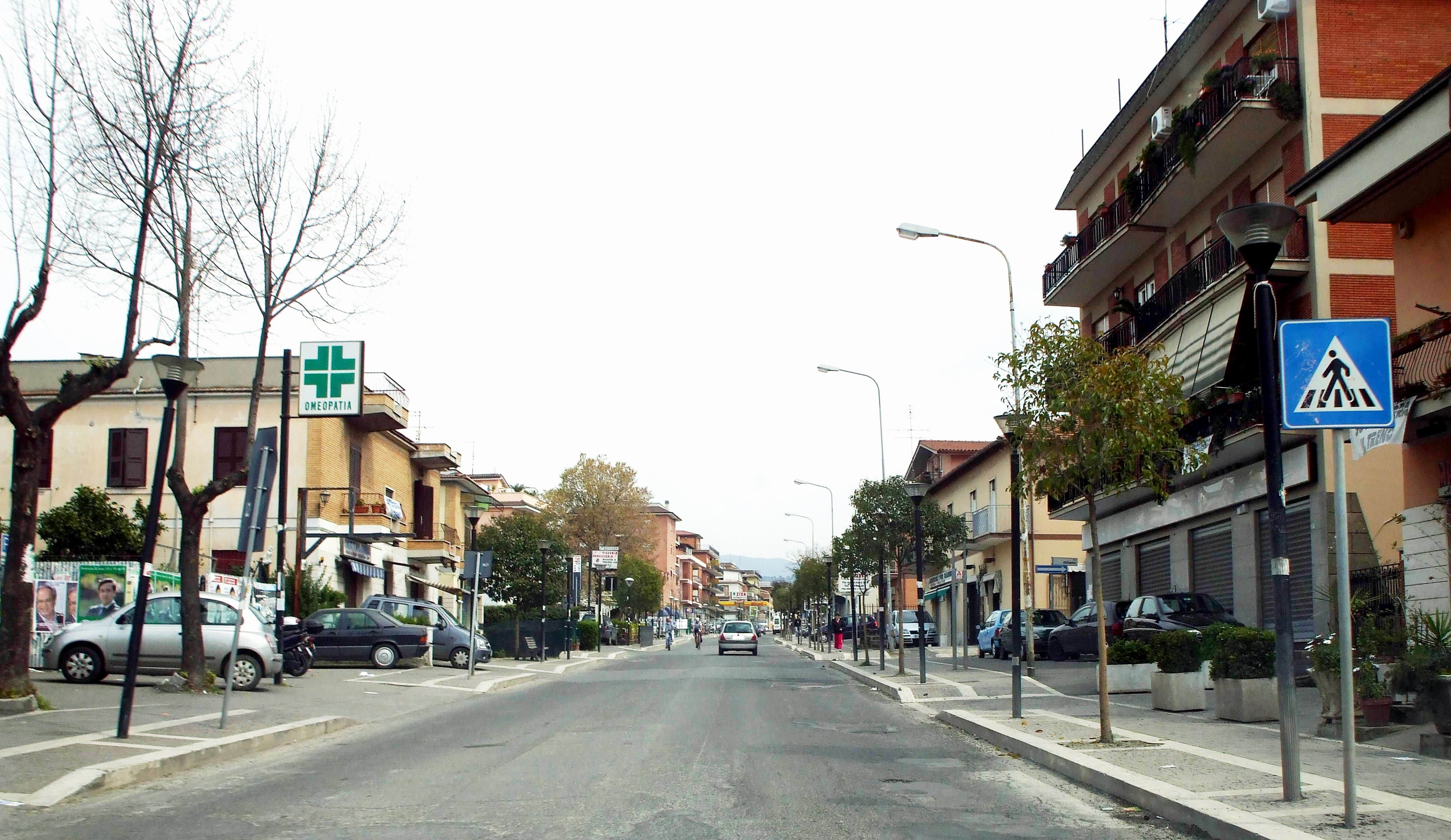 Pavona